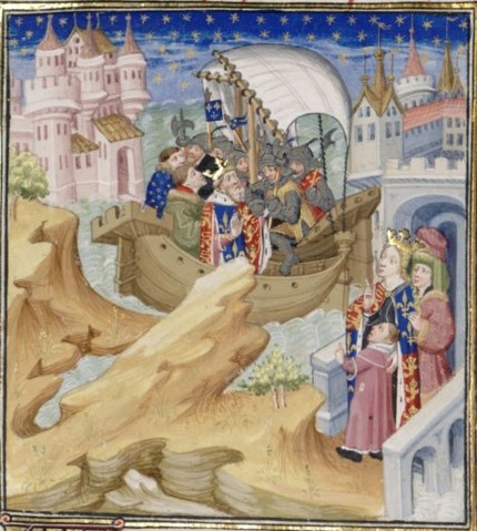 arrestation d'edouard 2